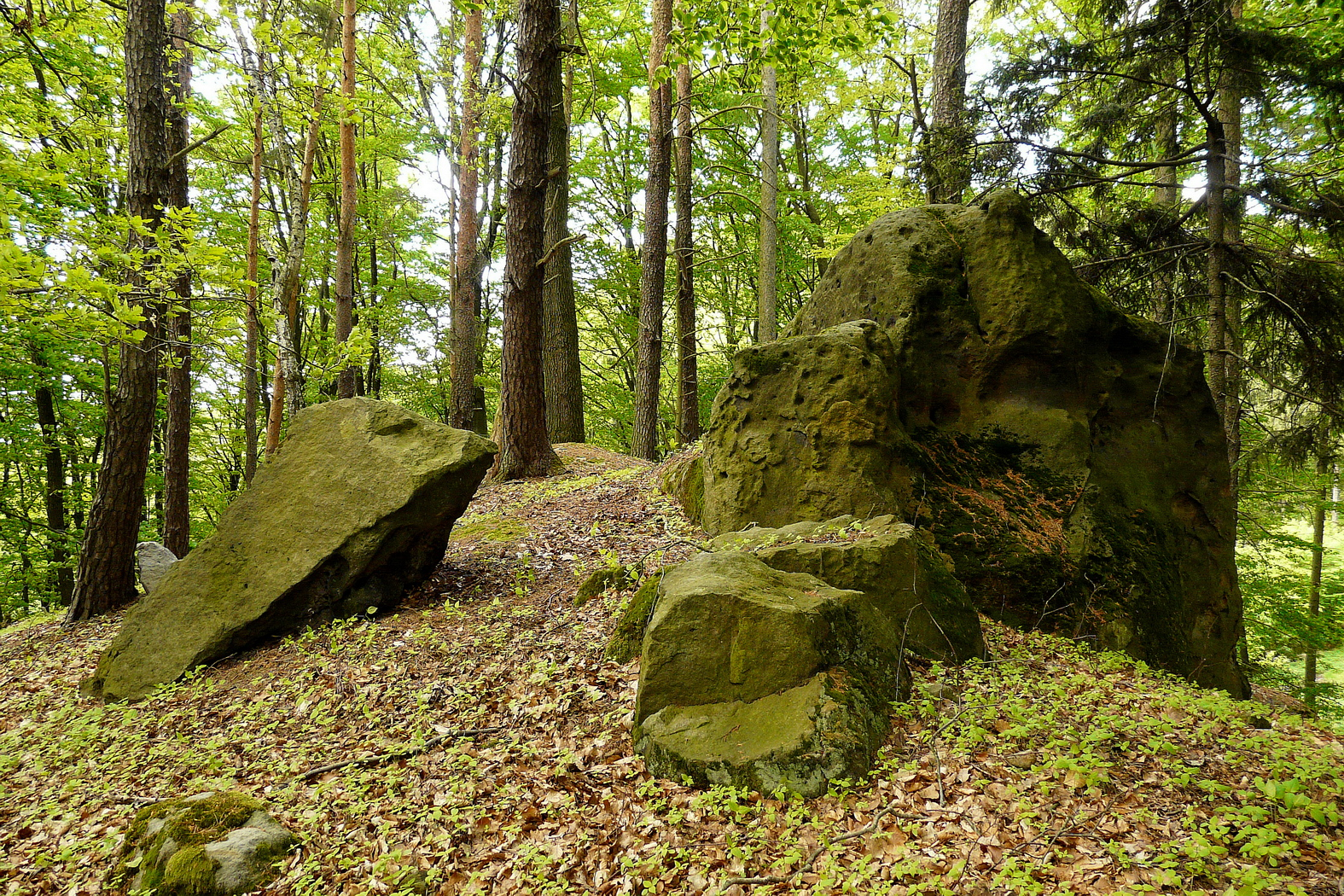 Pískovce? na Zámeckém vrchu (druh horniny nejistý)